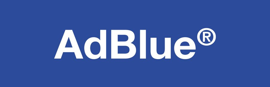 AdBlue Logo